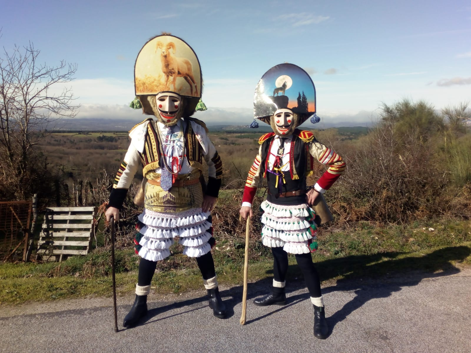 Felos nunha aldea de Maceda.